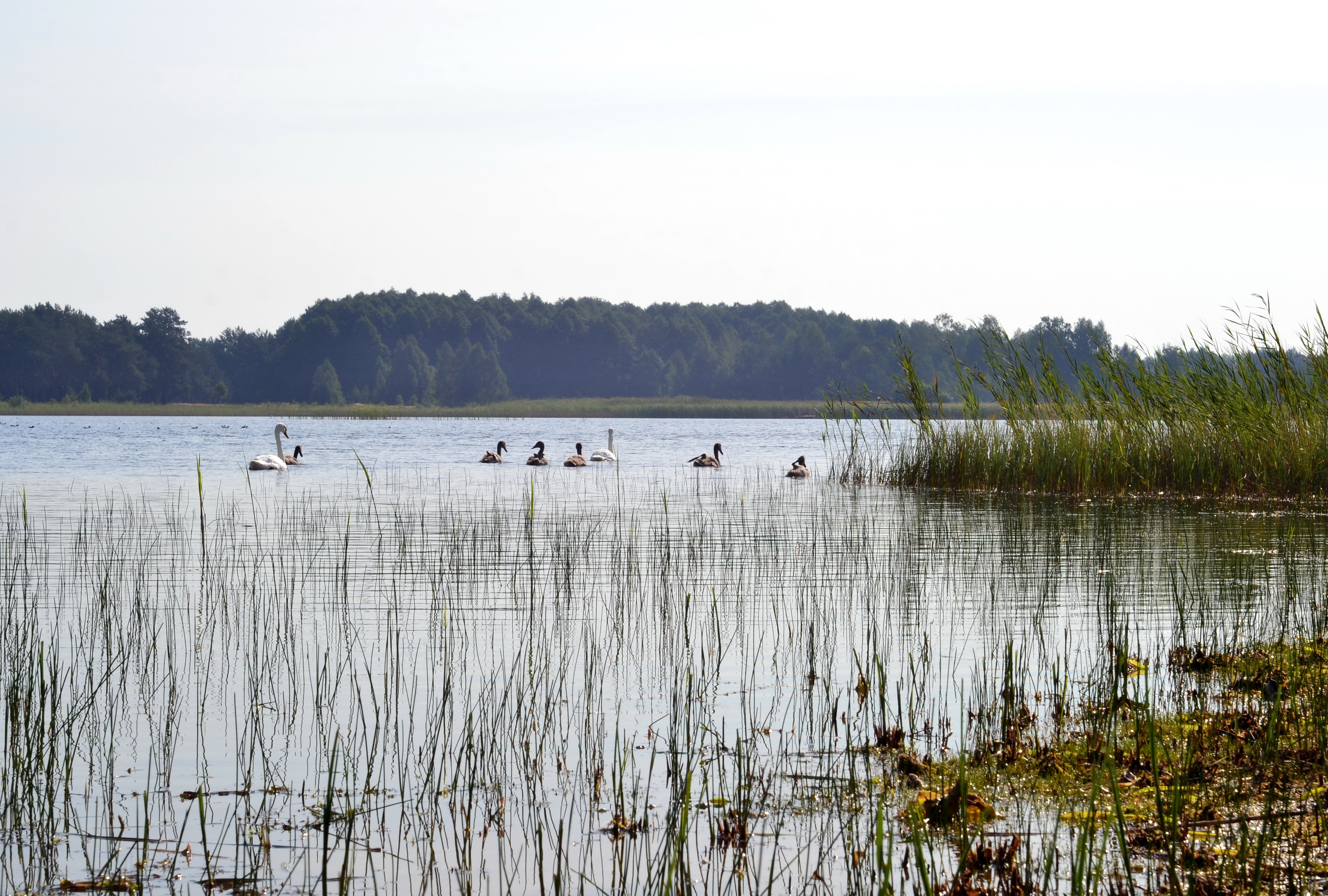 «Озеро Радожичі» - заказник гідрологічний (Волинська область, Ратнівський р-н, с. Гірники. Гірниківська сільська рада. Площа 109,70 га) - вигляд з південно-західного берега